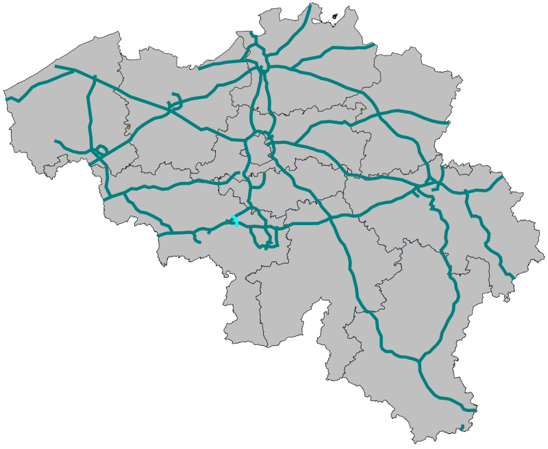 Traject A501 (België)